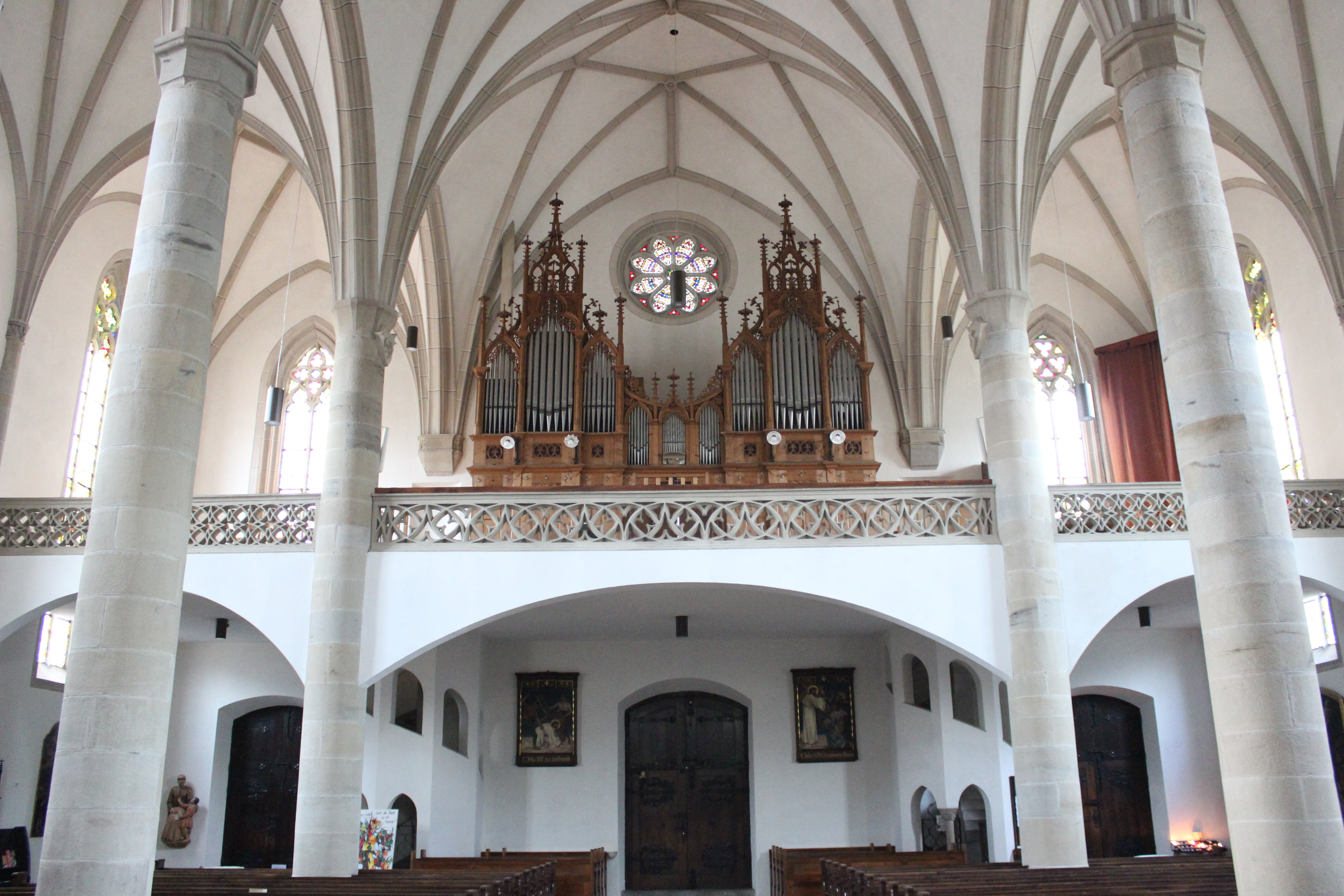 Pfarrkirche St. Quirikus und Julitta in Tramin - Empore mit Orgel